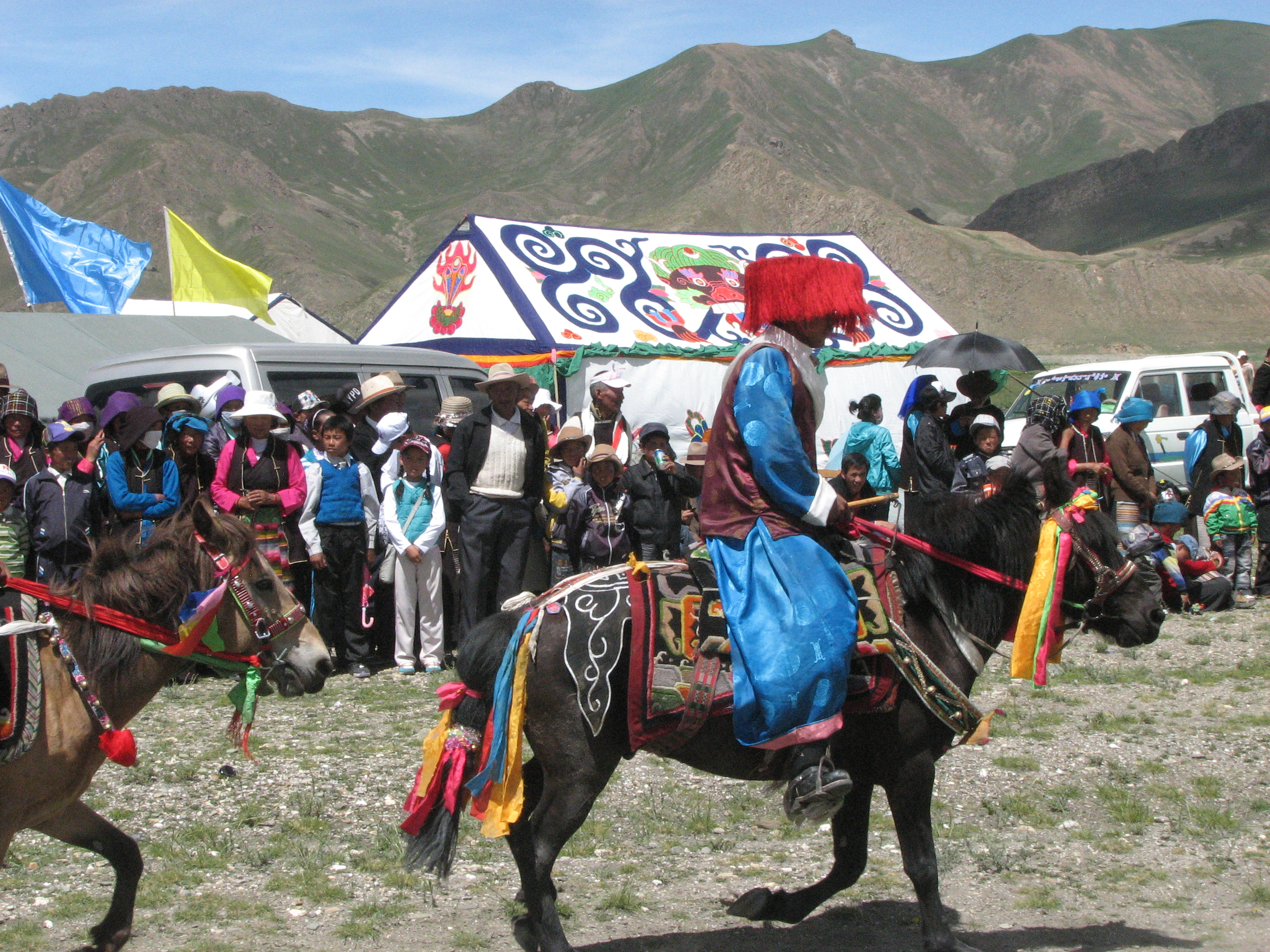 Festival tibétain. A noter les tentes aux motifs tibétains (bouddhiques) et mongols (motifs des pierre à cerf[1] caractéristiques en arrière-plan, et le costume bleu Tengri typiquement mongol du cavalier. Celui-ci comporte notamment les caractères chinois de longévité, shou, omniprésent dans les décorations mongoles.